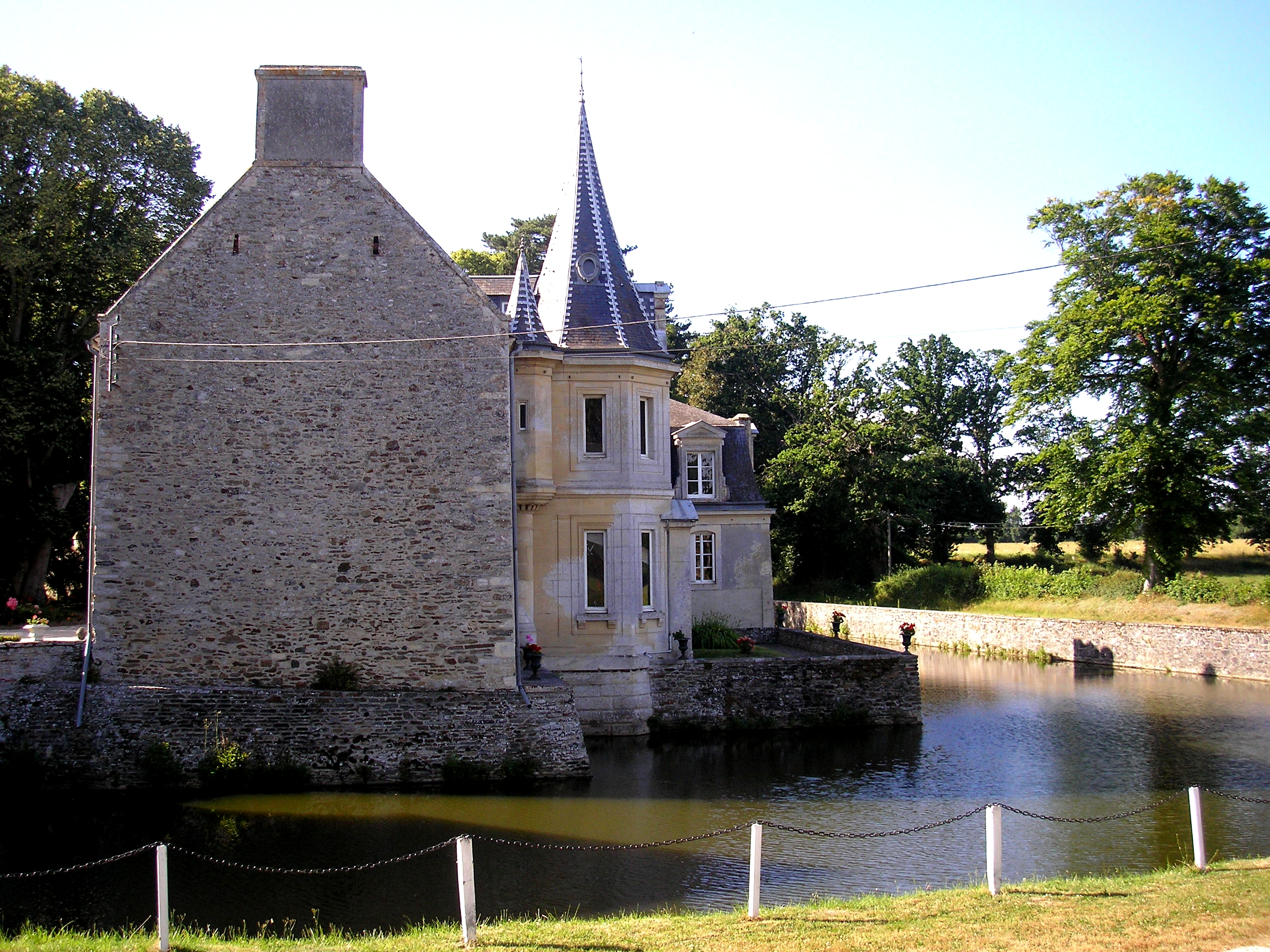 Livry (Normandie, France). Château de Parfouru-l'Éclin.